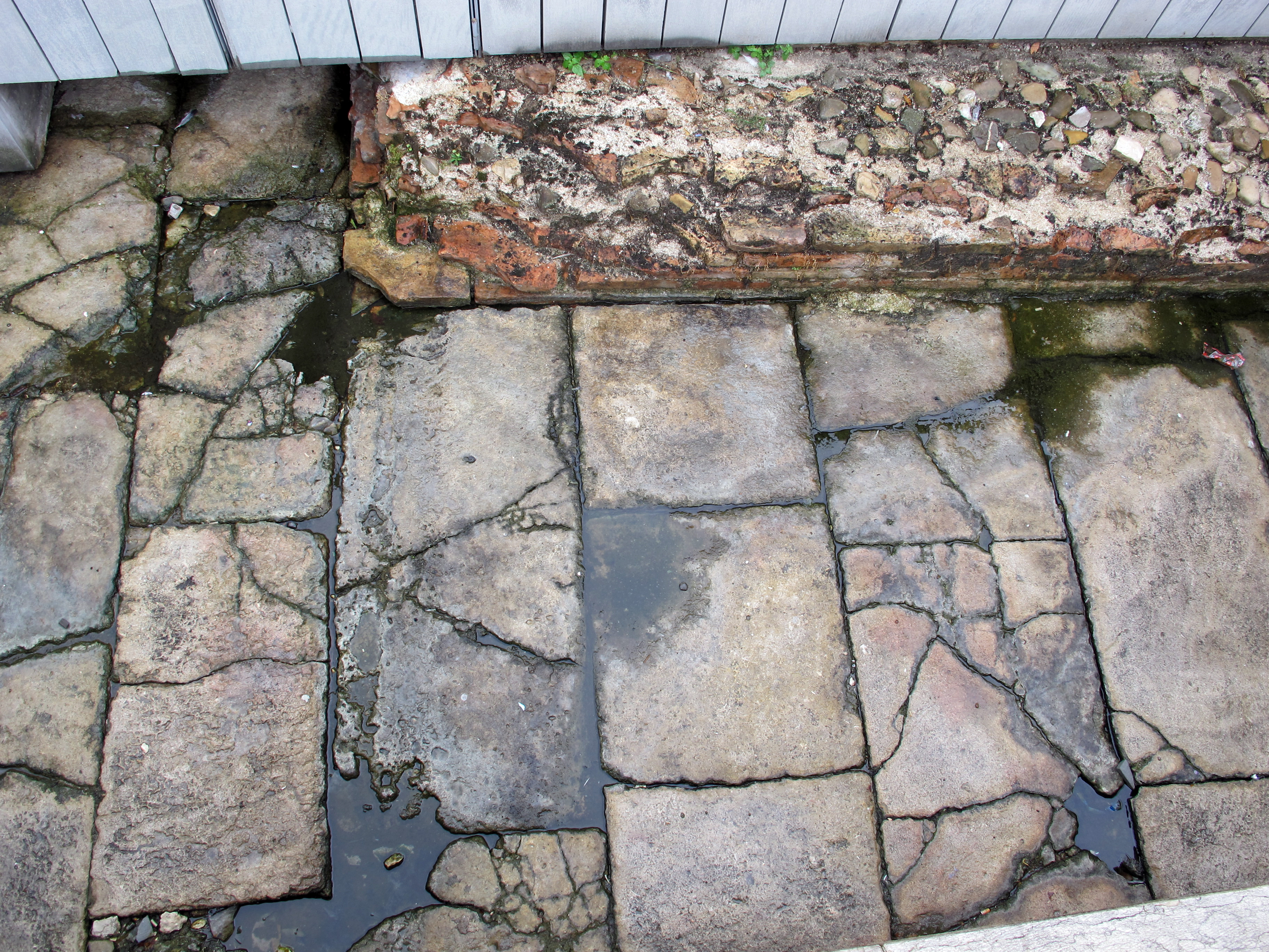 Piazza Tre Martiri - MIBAC This is a photo of a monument which is part of cultural heritage of Italy.